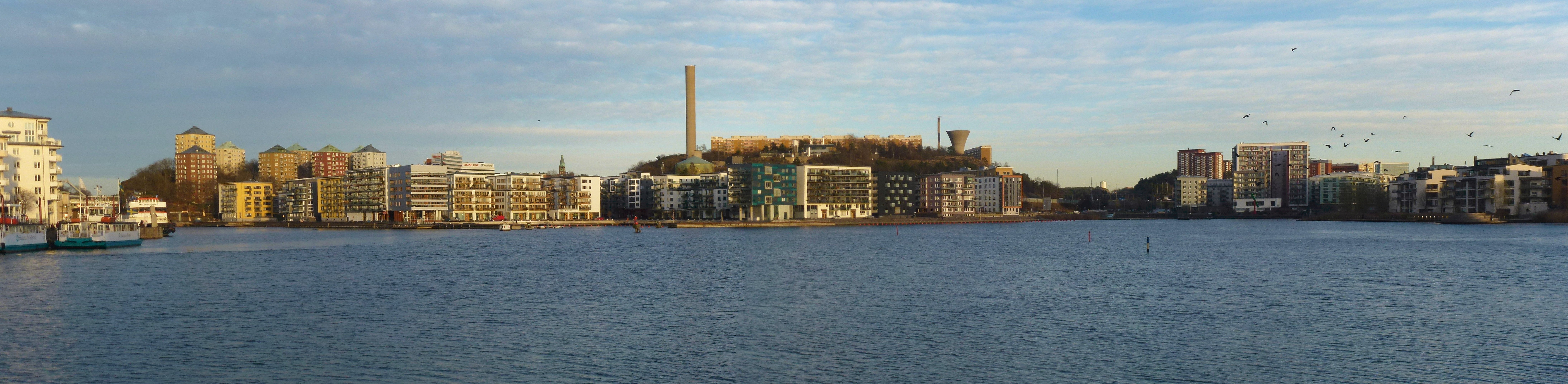 Hammarby sjö mot ost med Henriksdalsberget i mitten